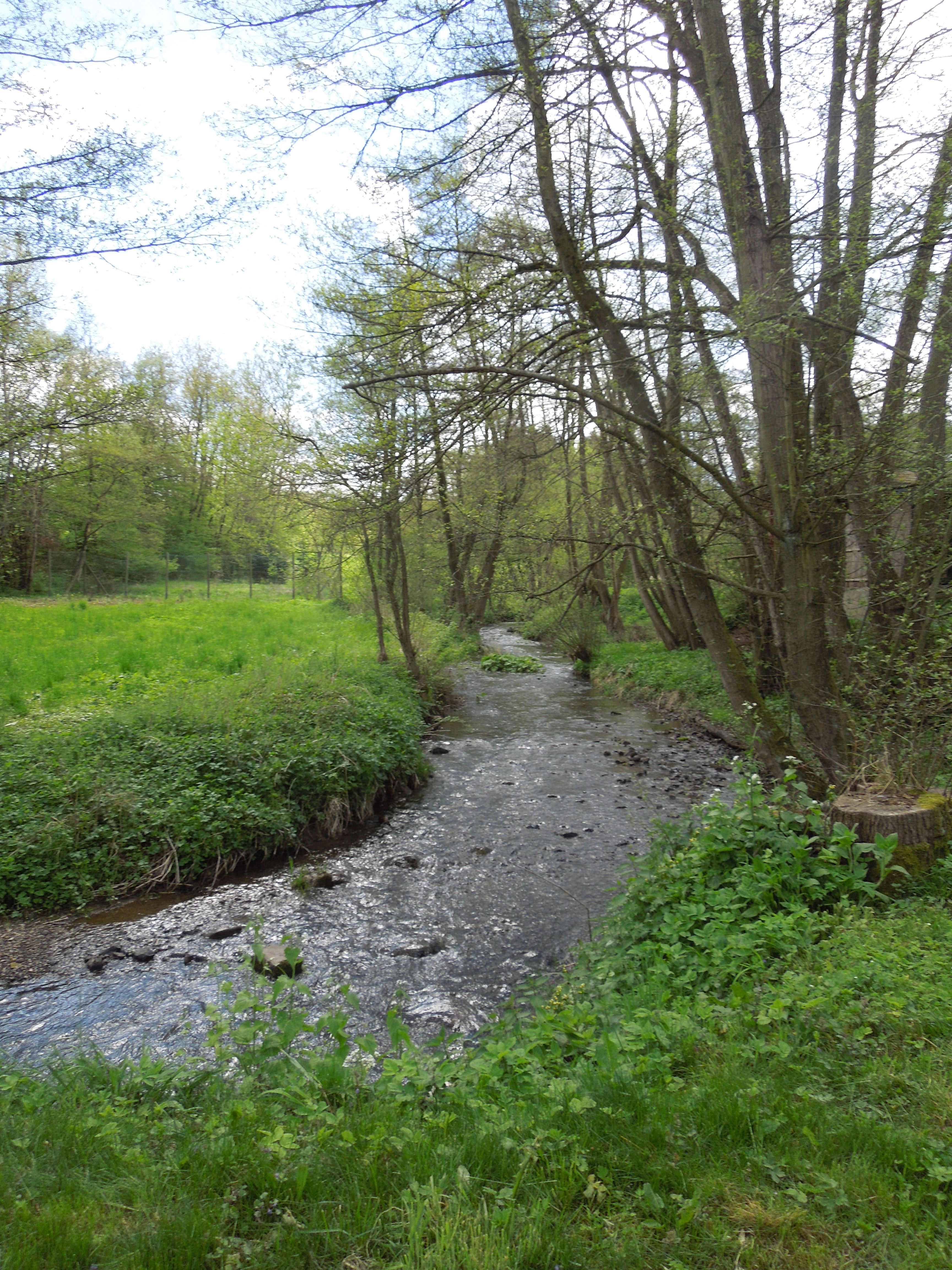 Die Urff im Bad Wildunger Stadtteil Bergfreiheit